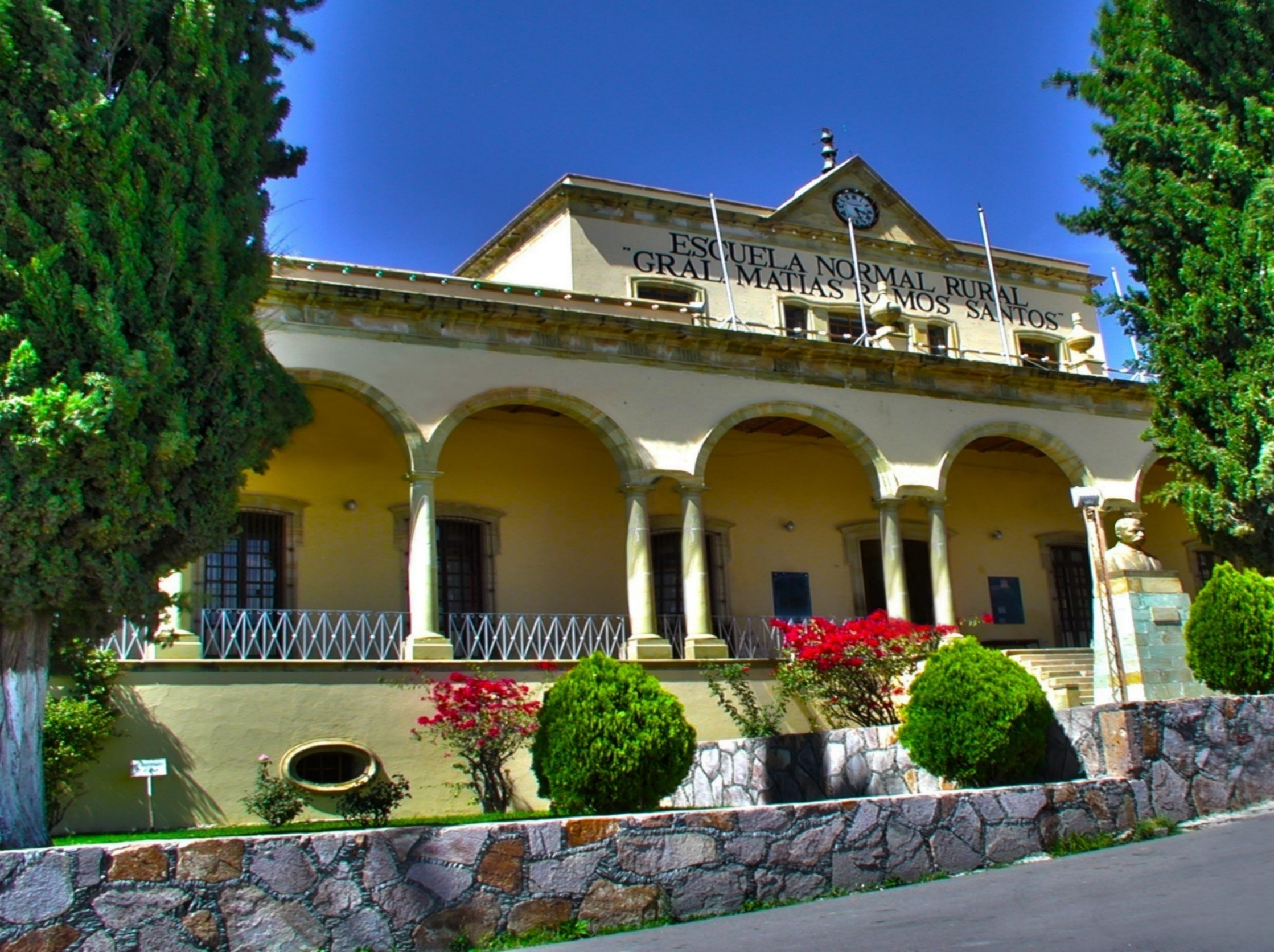 Escuela Normal Rural Gral. Matias Ramos Santos en San Marcos Zacatecas